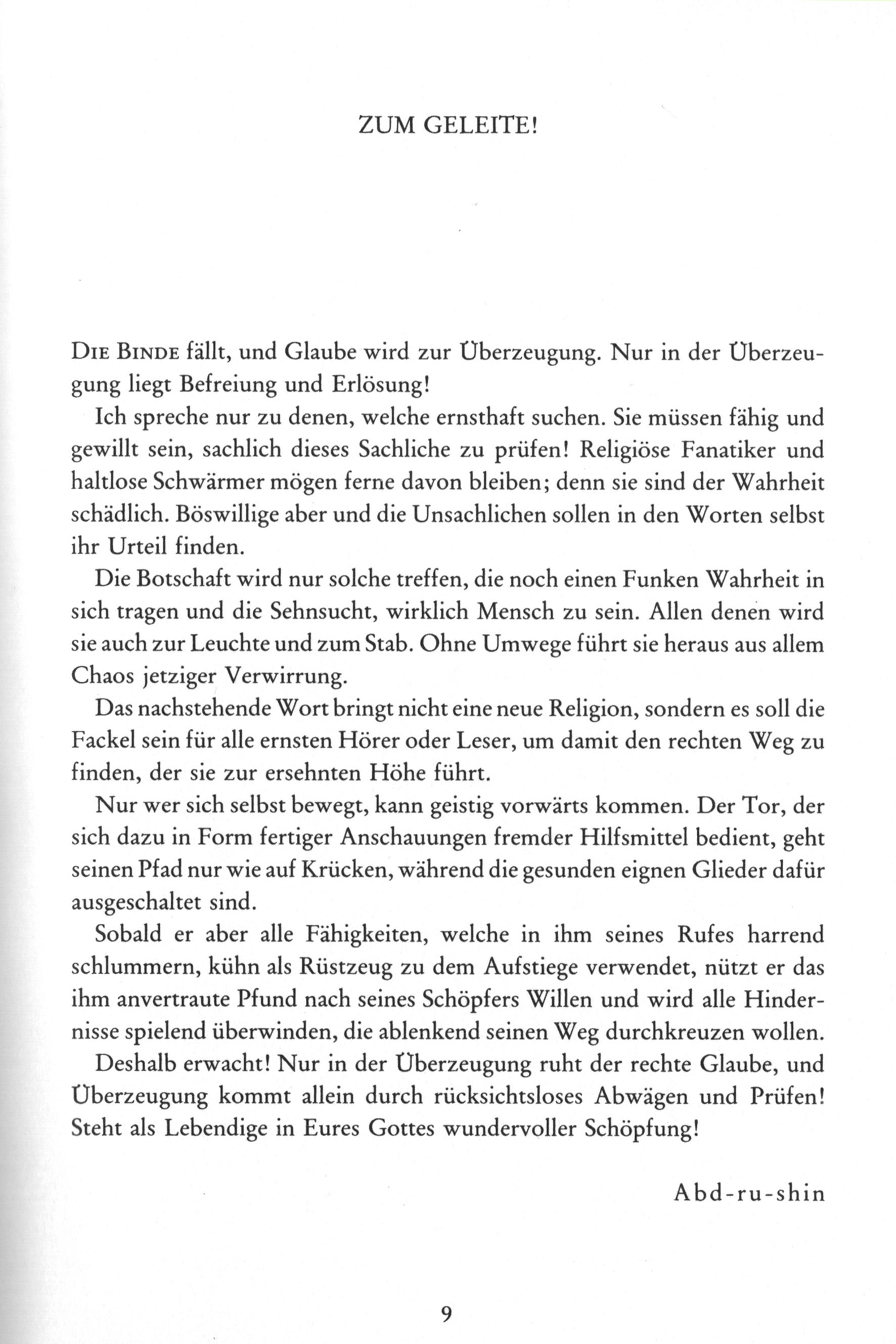 Gralsbotschaft "Im Lichte der Wahrheit", Zum Geleite!